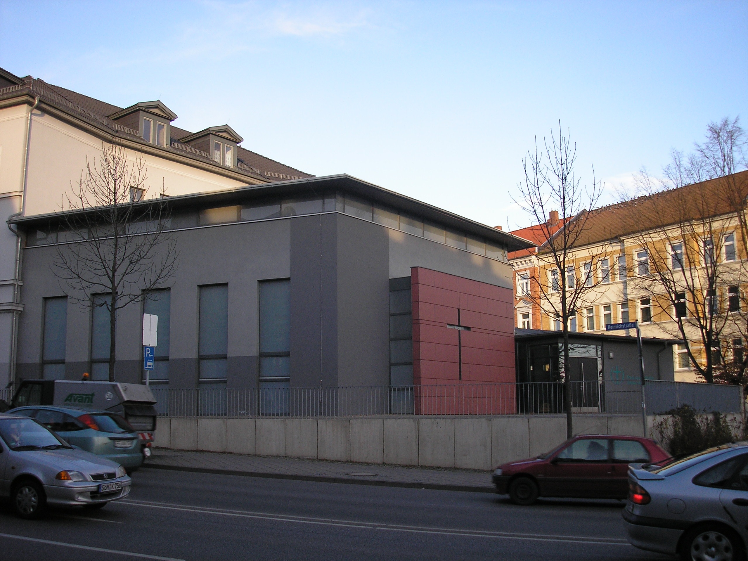 Gebäude der Freien Evangelischen Gemeinde in der Heinrichstraße in Erfurt.